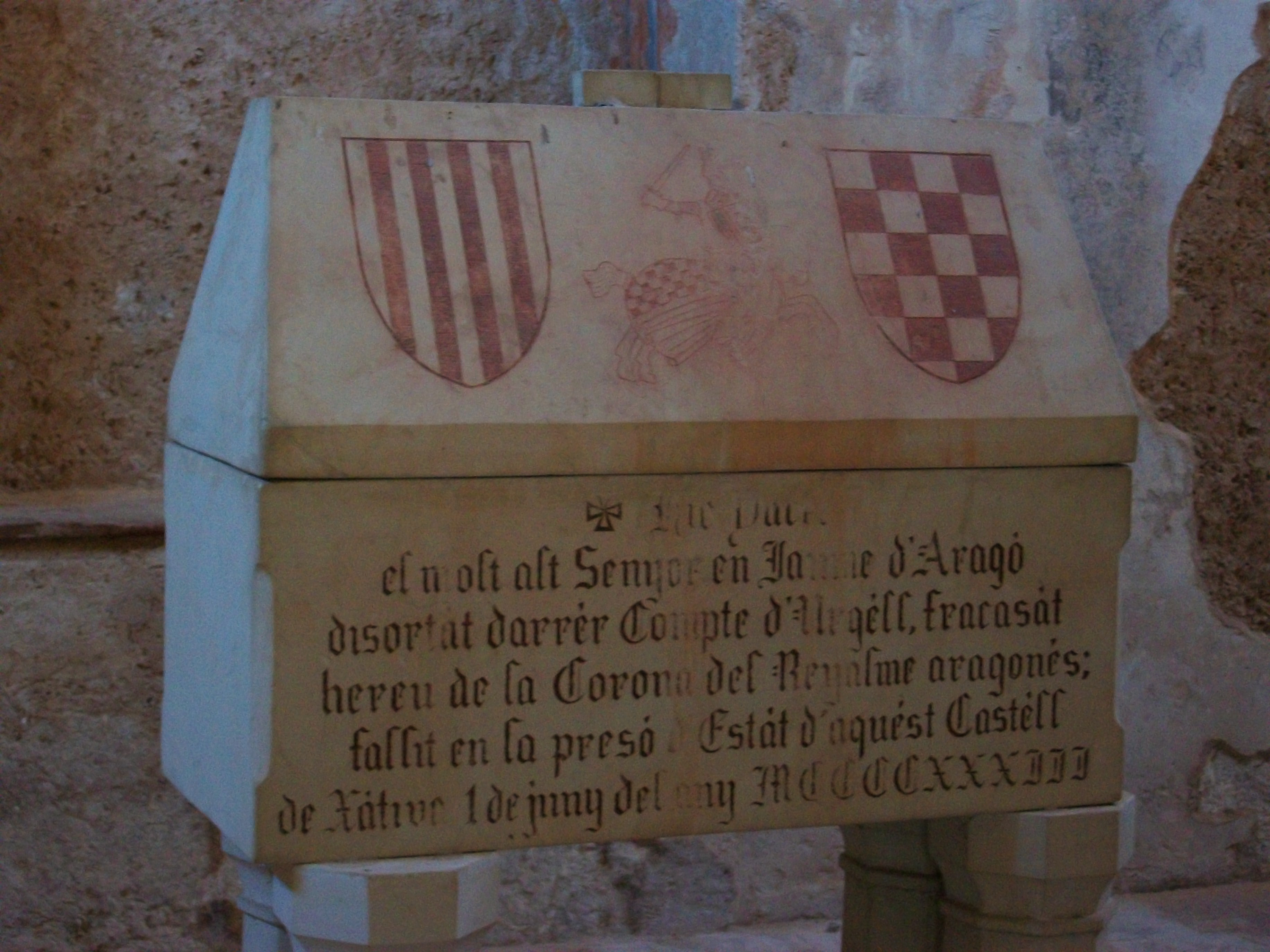 Sarcòfag modern que, suposadament, conté les despulles del comte Urgell, Jaume II d'Urgell, pretendent a la Corona d'Aragó en el Compromís de Casp, pres en el castell de Xàtiva, on va morir. Es troba a la capella de santa Maria del mateix castell.